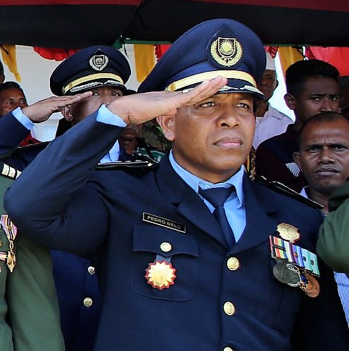 Pedro Belo bei den Feierlichkeiten zum Proklamationstag 2019